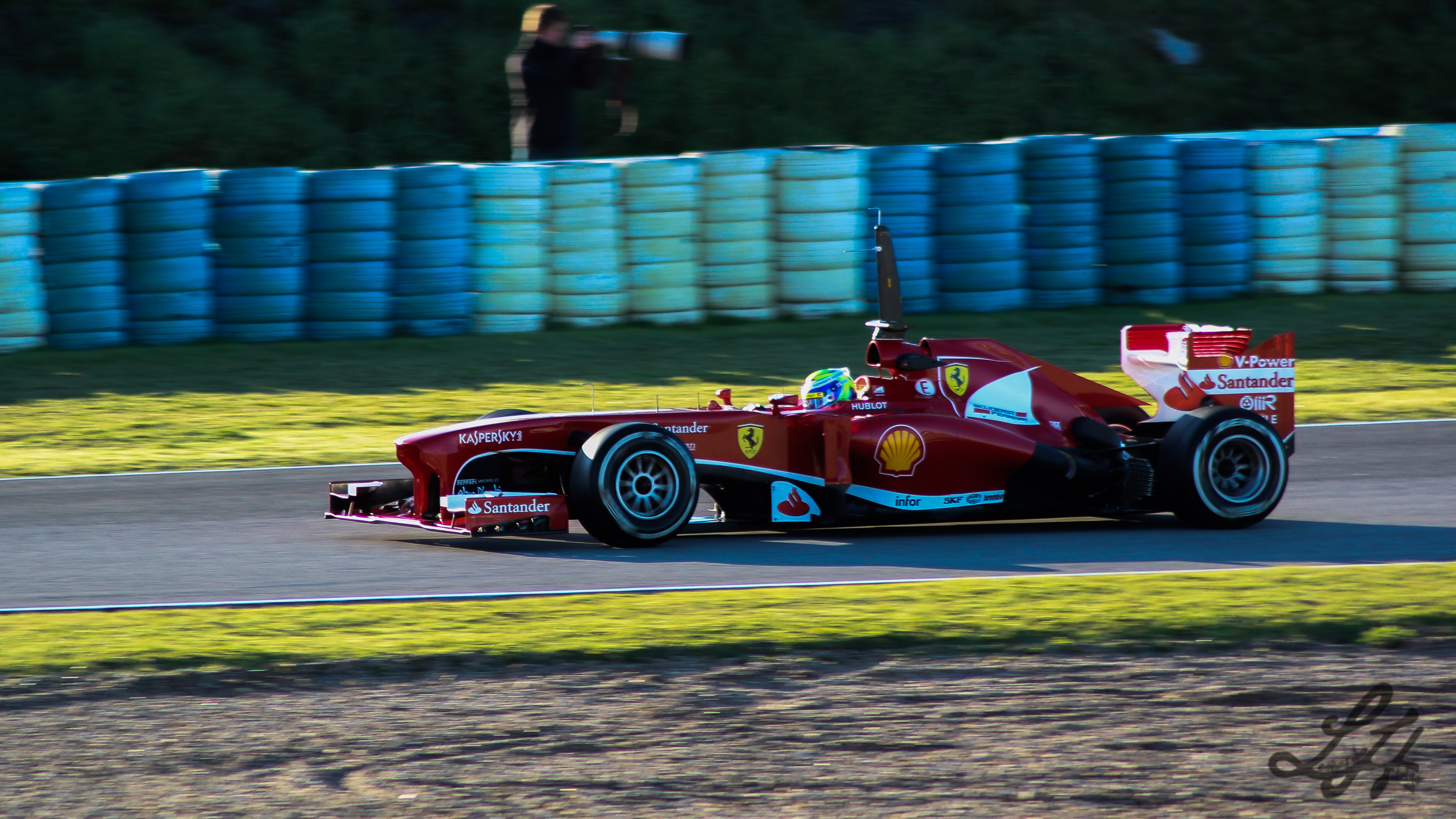 Fotos hechas el 7 de Febrero de 2013 en el circuito de Jerez, plena pre-temporada de F1. Would you like to follow me on Instagram and Twitter?